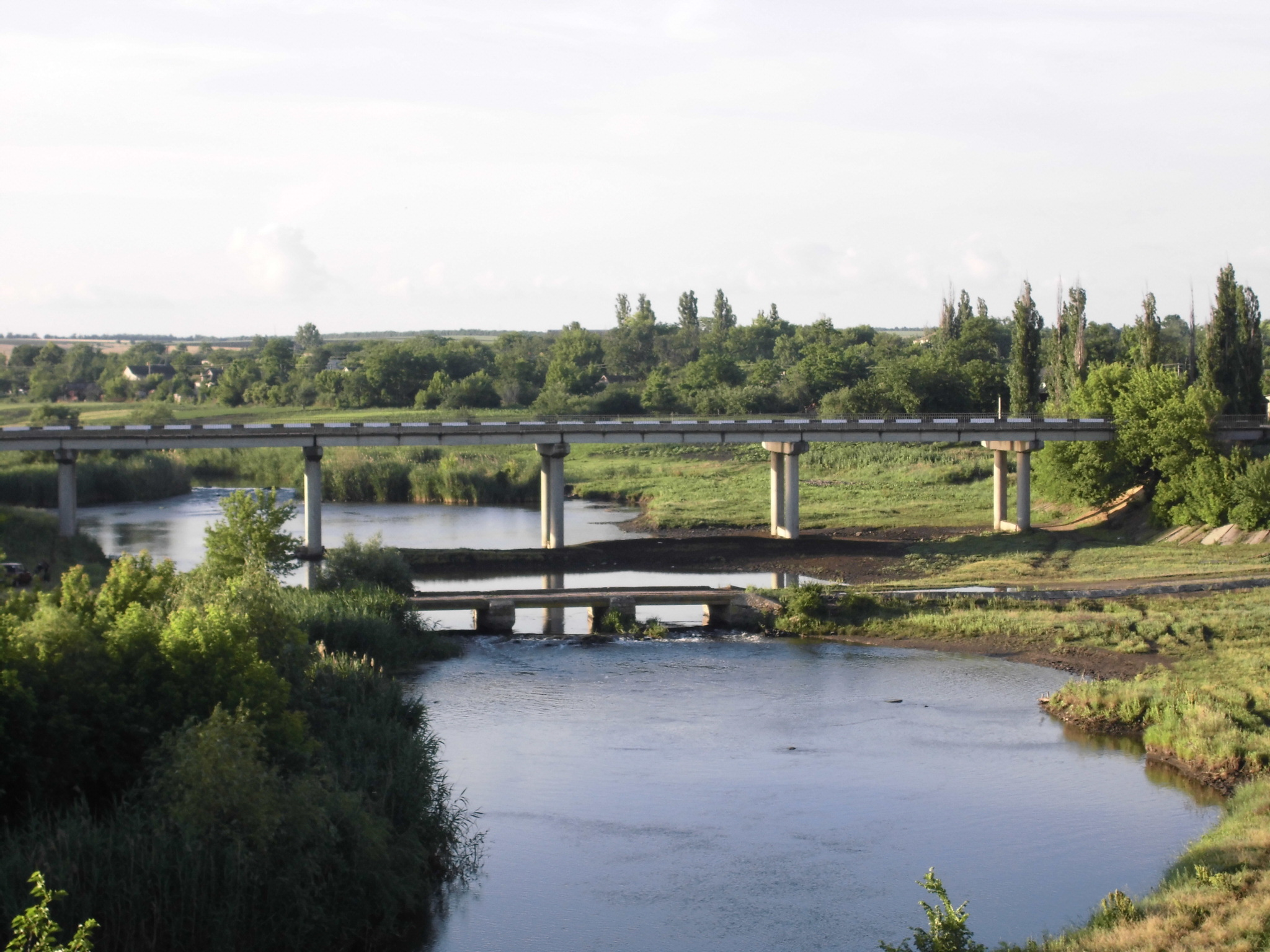 Символи єднання різних епох і поколінь!